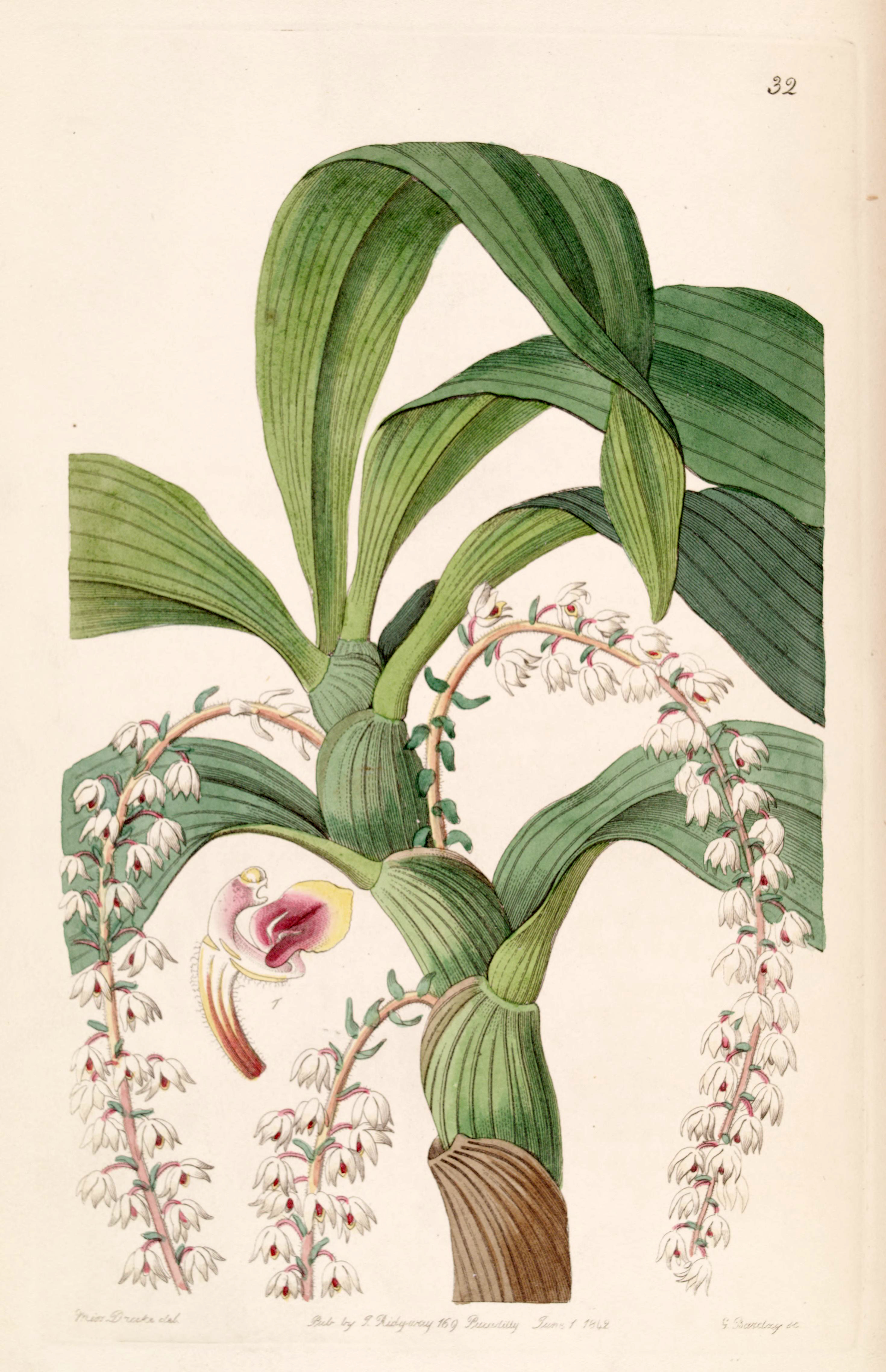 Eria polyura